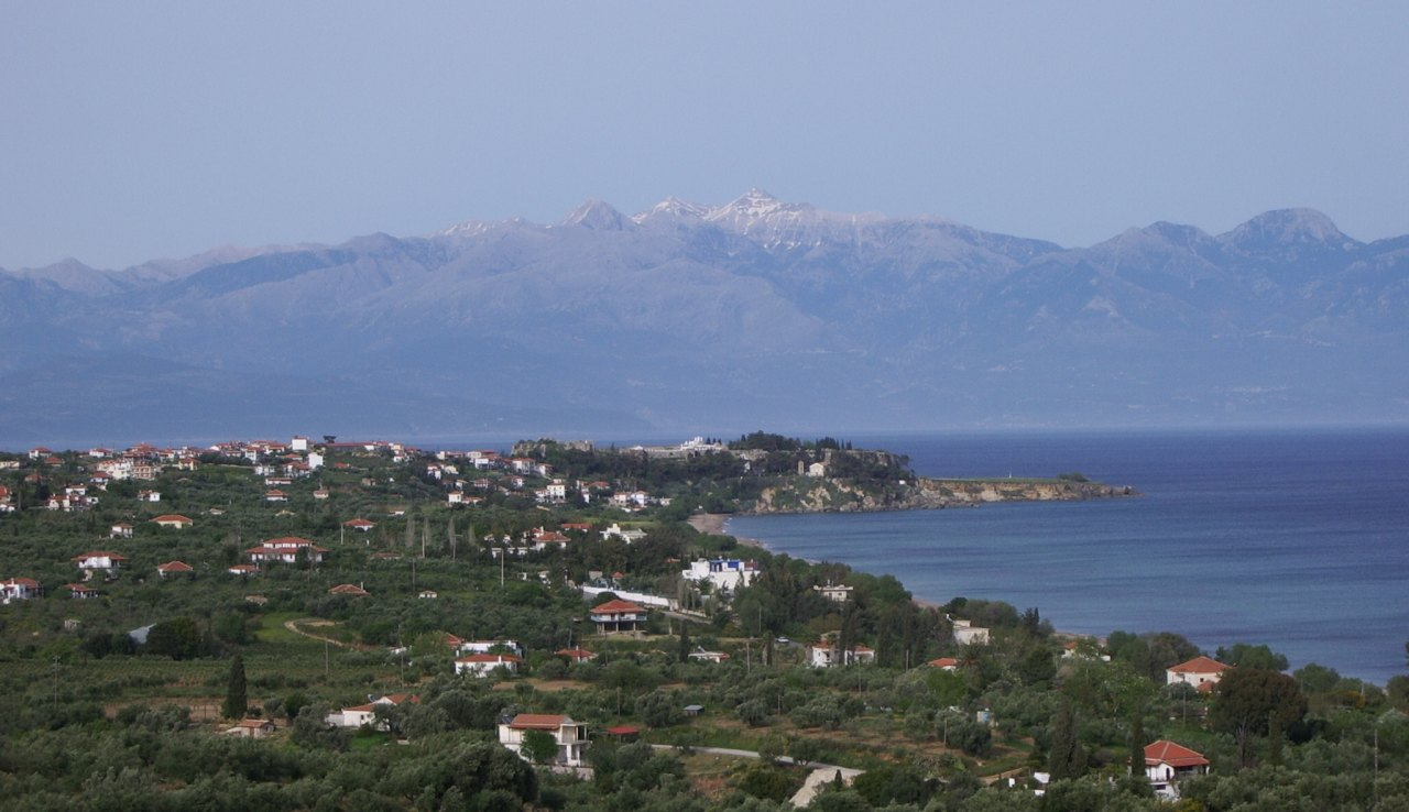 Koroni von Westen, im Hintergrund das Taygetos-Gebirge mit dem Prof. Ilias. In Bildmitte die Festung, rechts das tiefer gelegene Kap-Plateau.